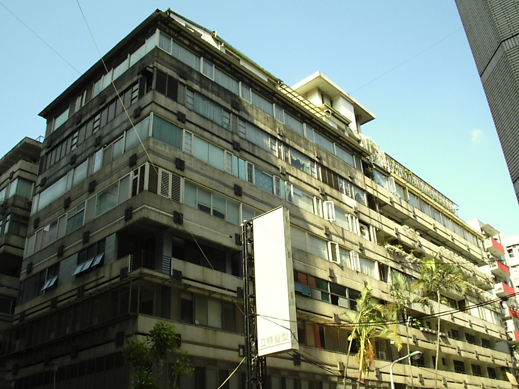 國泰建設創立於1964年，此為1965年該公司首次興建的高層電梯大廈「敦化大廈」。該大廈位於台北市大安區敦化南路一段187巷，共有地上九層。